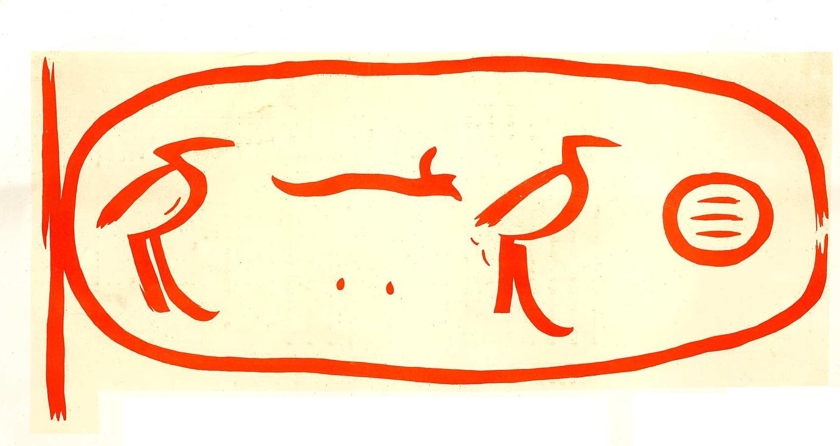 Kartuše paovníka Chufua; graffito pracovní čety na bloku z Velké pyramidy